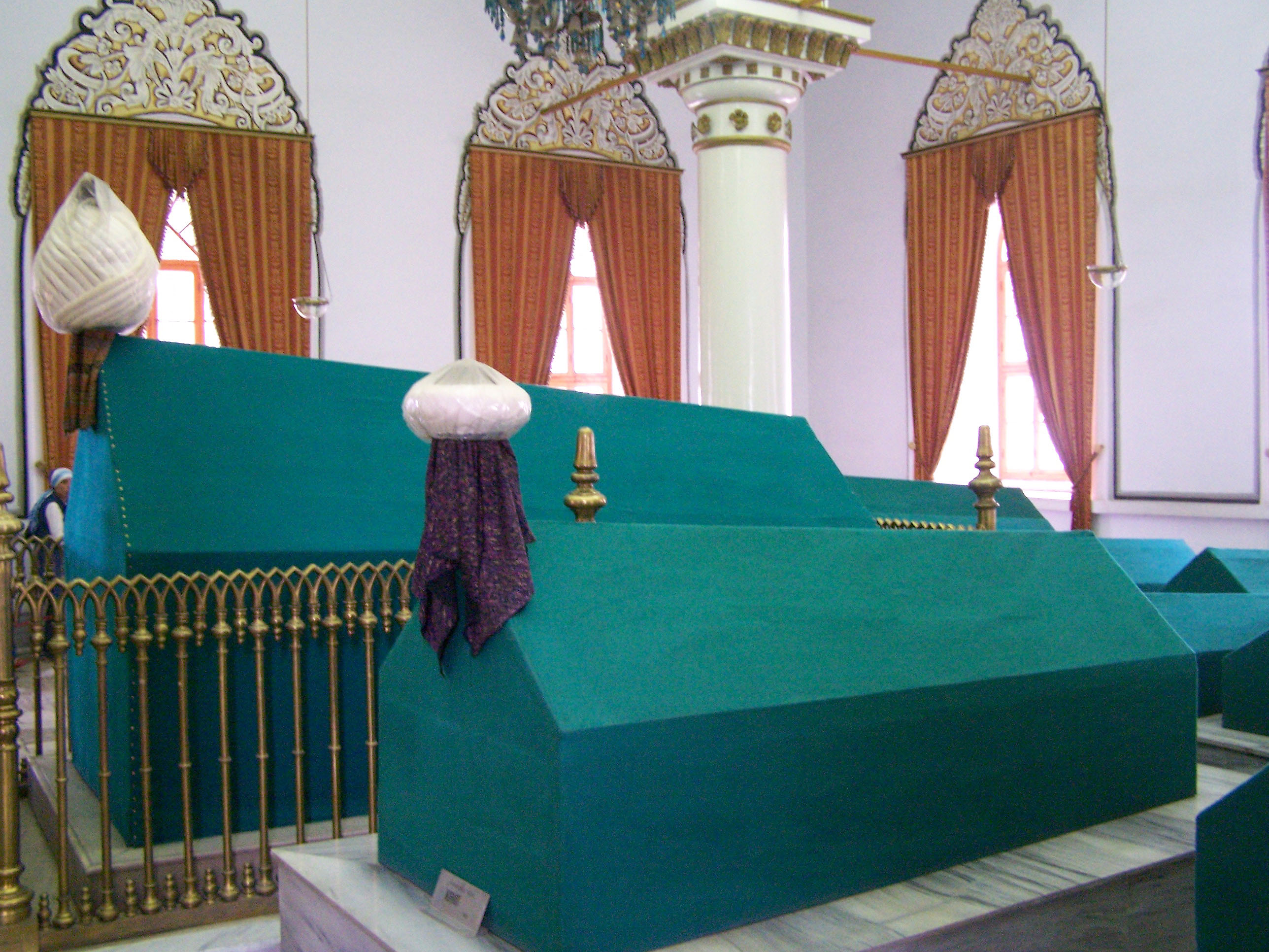 Türbe of Orhan Gazi in Bursa, Turkey